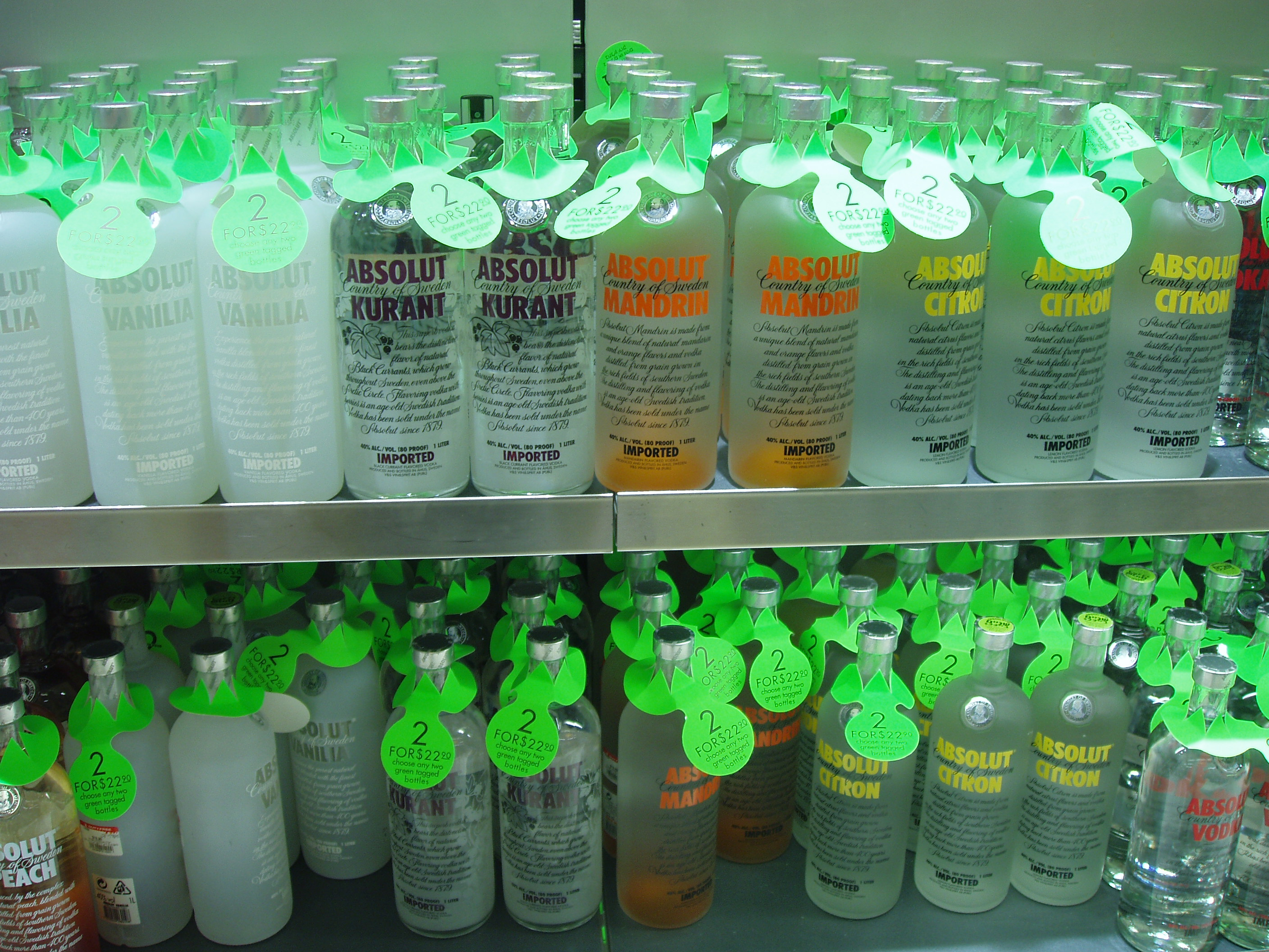 וודקה אבסולוט במגוון טעמים. צילם דוד שי בדיוטי פרי בנתב"ג.